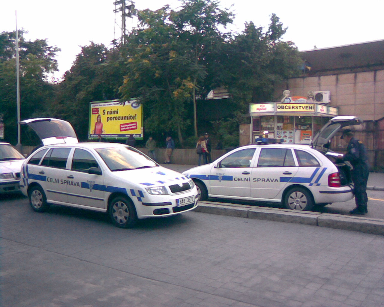 Akce Celní správy České republiky ve stánku u pražského Smíchovského nádraží (stánek je na pozemku Českých drah) – kontrola zákazu prodeje tvrdého alkoholu a možná i odběr vzorků (viz metanolové otravy roku 2012 v Česku).